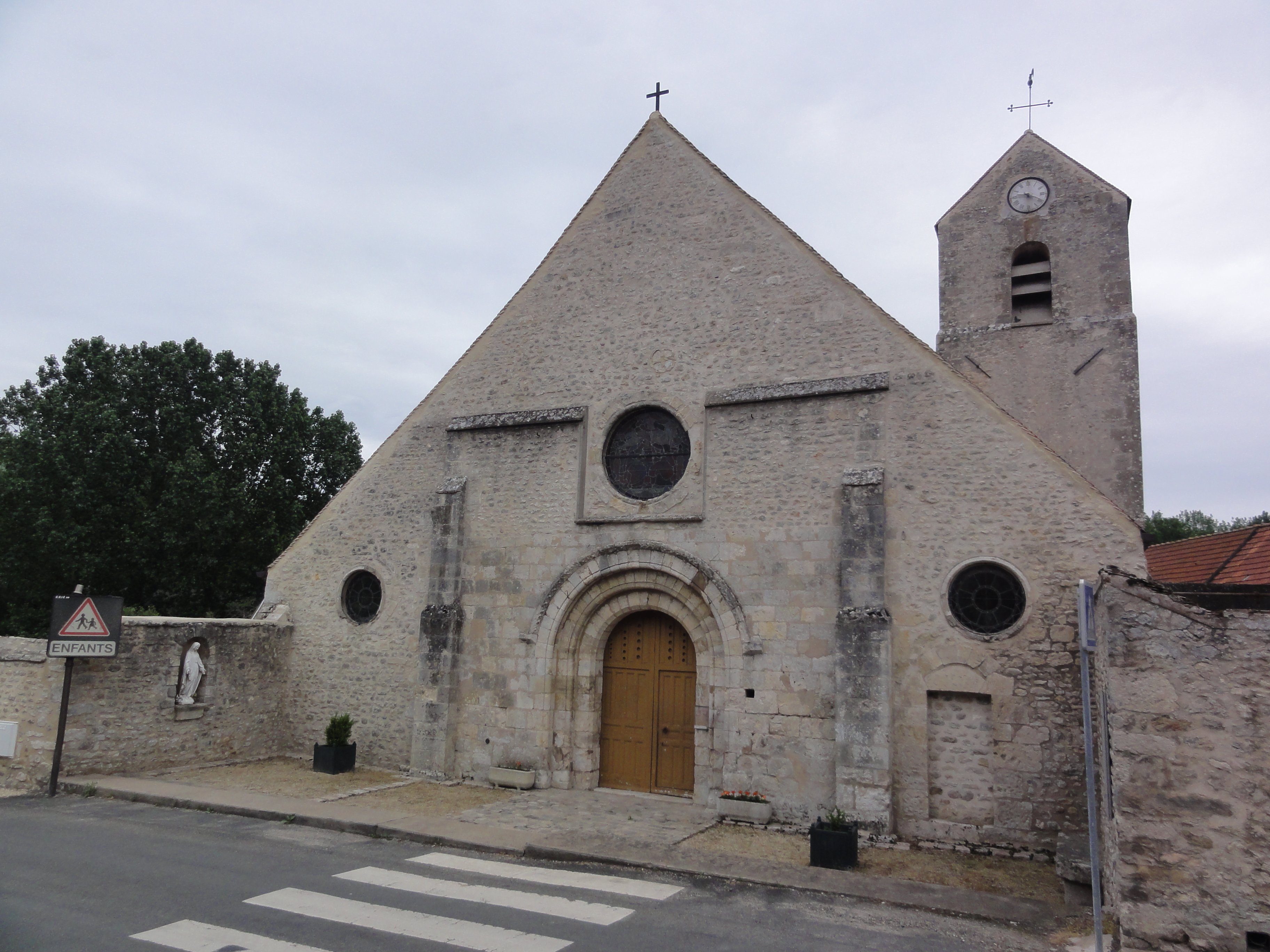 Saint-Cyr-la-Rivière (Essonne) Église . NB. La photo ne correspond pas avec celle figurant sur la base Mérimée, mais elle correspond avec les images sur le Site de la paroisse